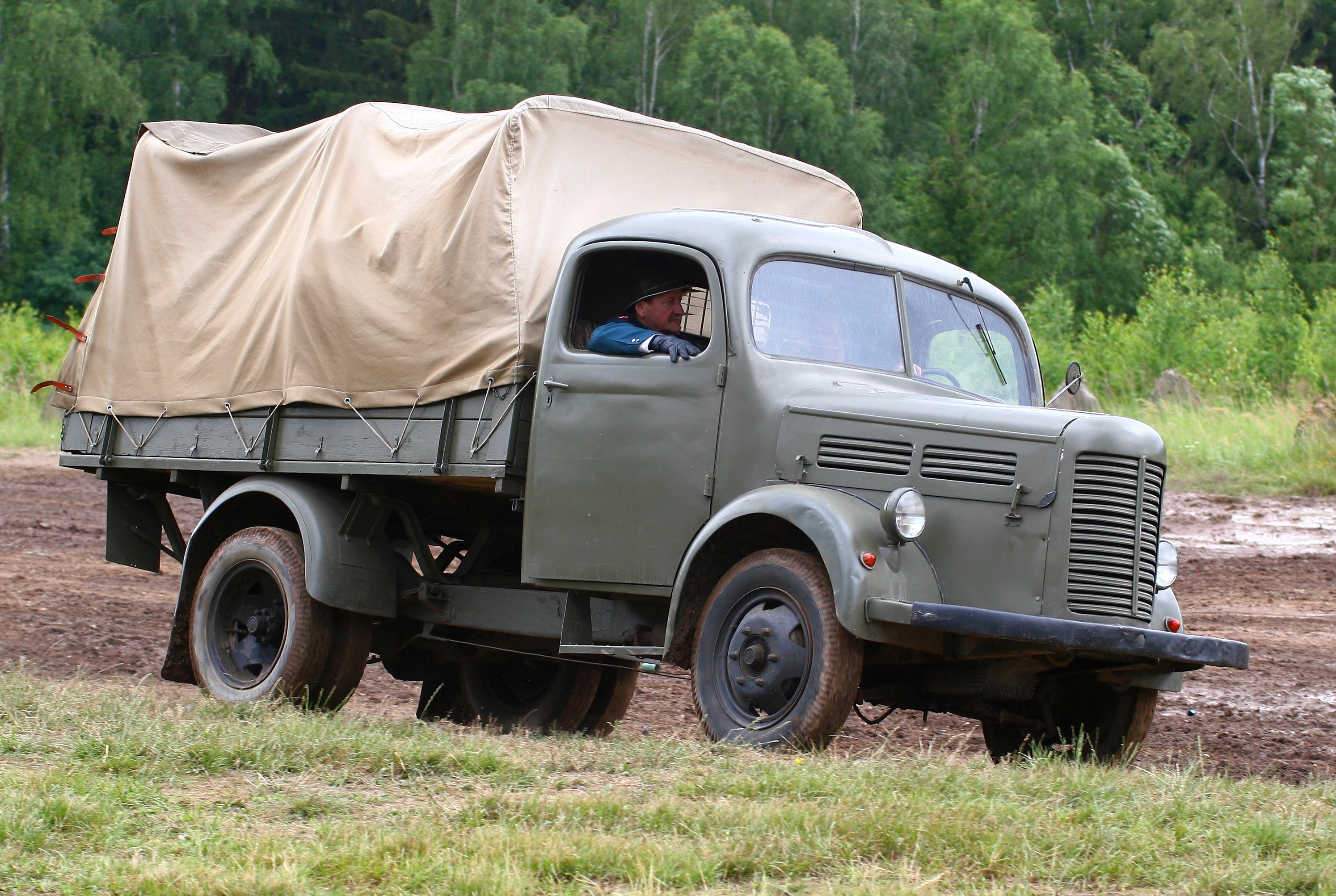 Rekonstrukce historických událostí, konkrétně potyček v německém pohraničí v roce 1938, při dynamických ukázkách na Dni pozemního vojska BAHNA 2018, který pořádá Velitel společných sil a Nadace pozemního vojska AČR.